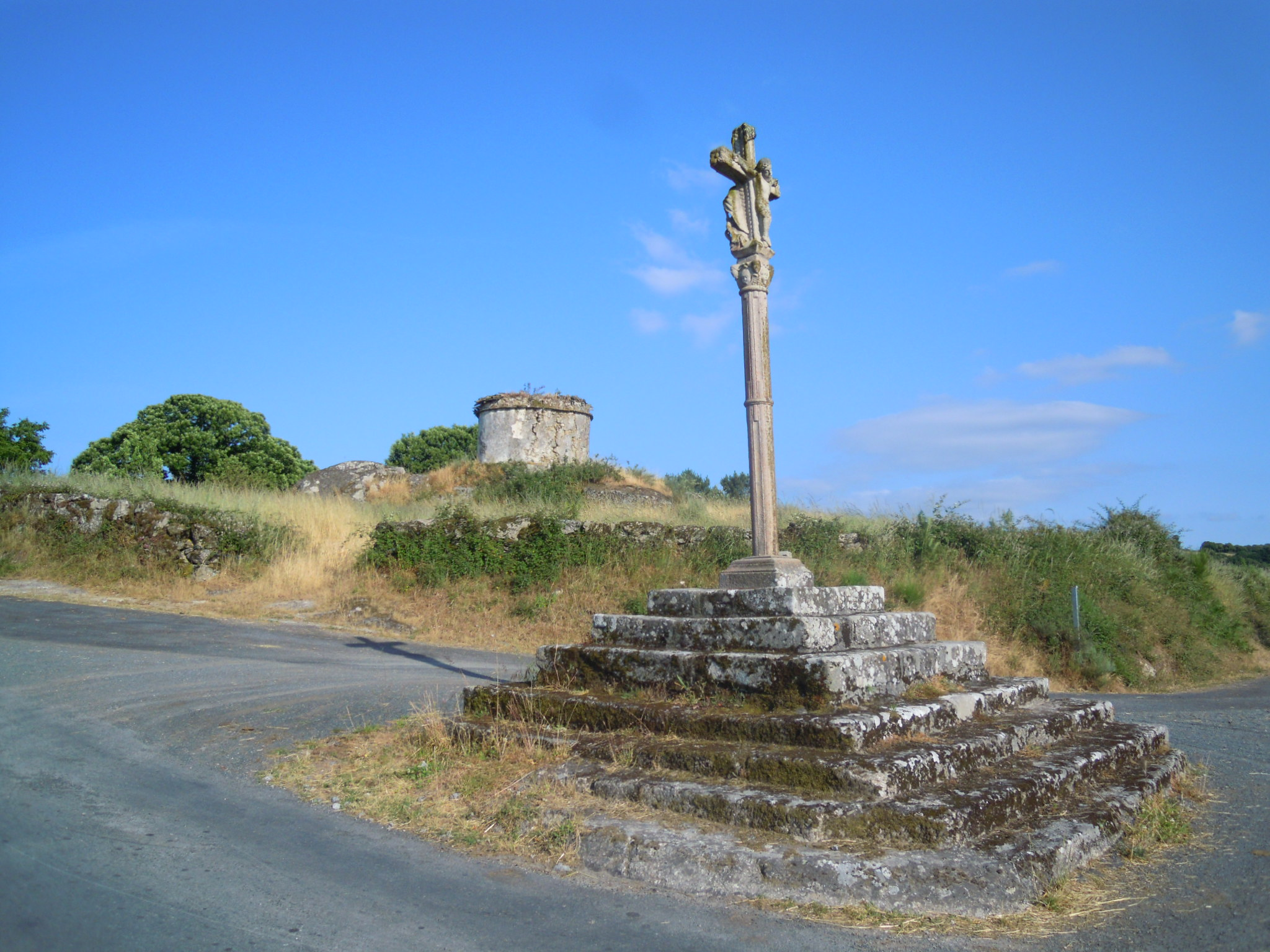 Cruceiro e pombal en Pedrafita (Chantada), no lugar de Mosteiro